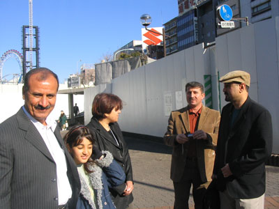 Membres du Congrès des libertés en Irak, lors d'une conférence à Tokyo